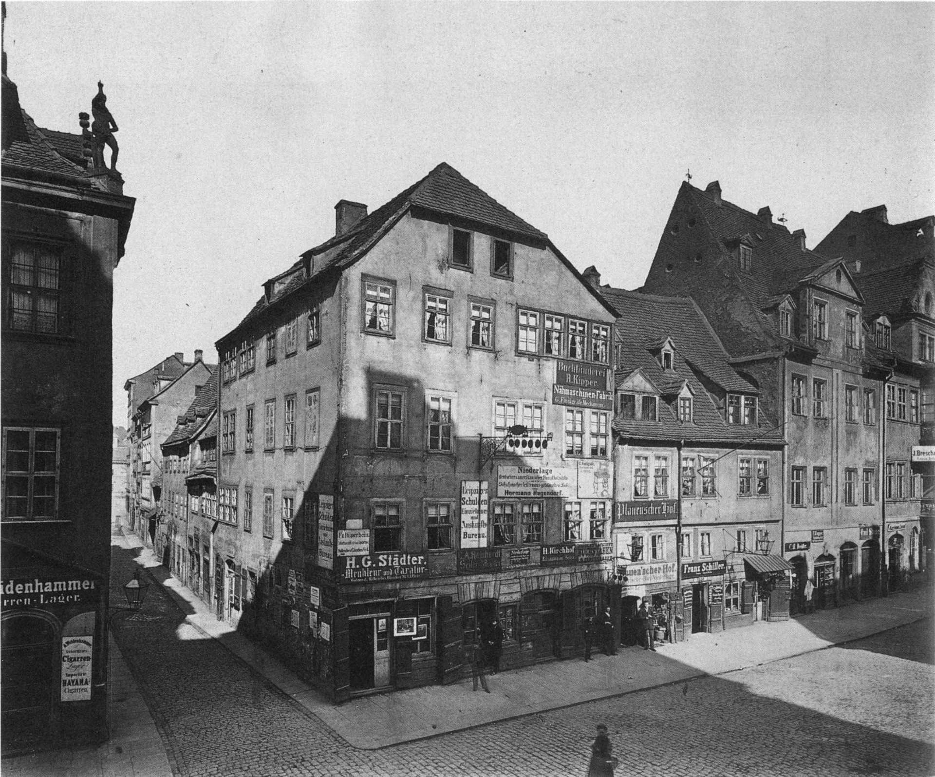 Ausspannhof und Herberge "Plauenscher Hof", Ecke Brühl/Hallesches Gäßchen, 1873.